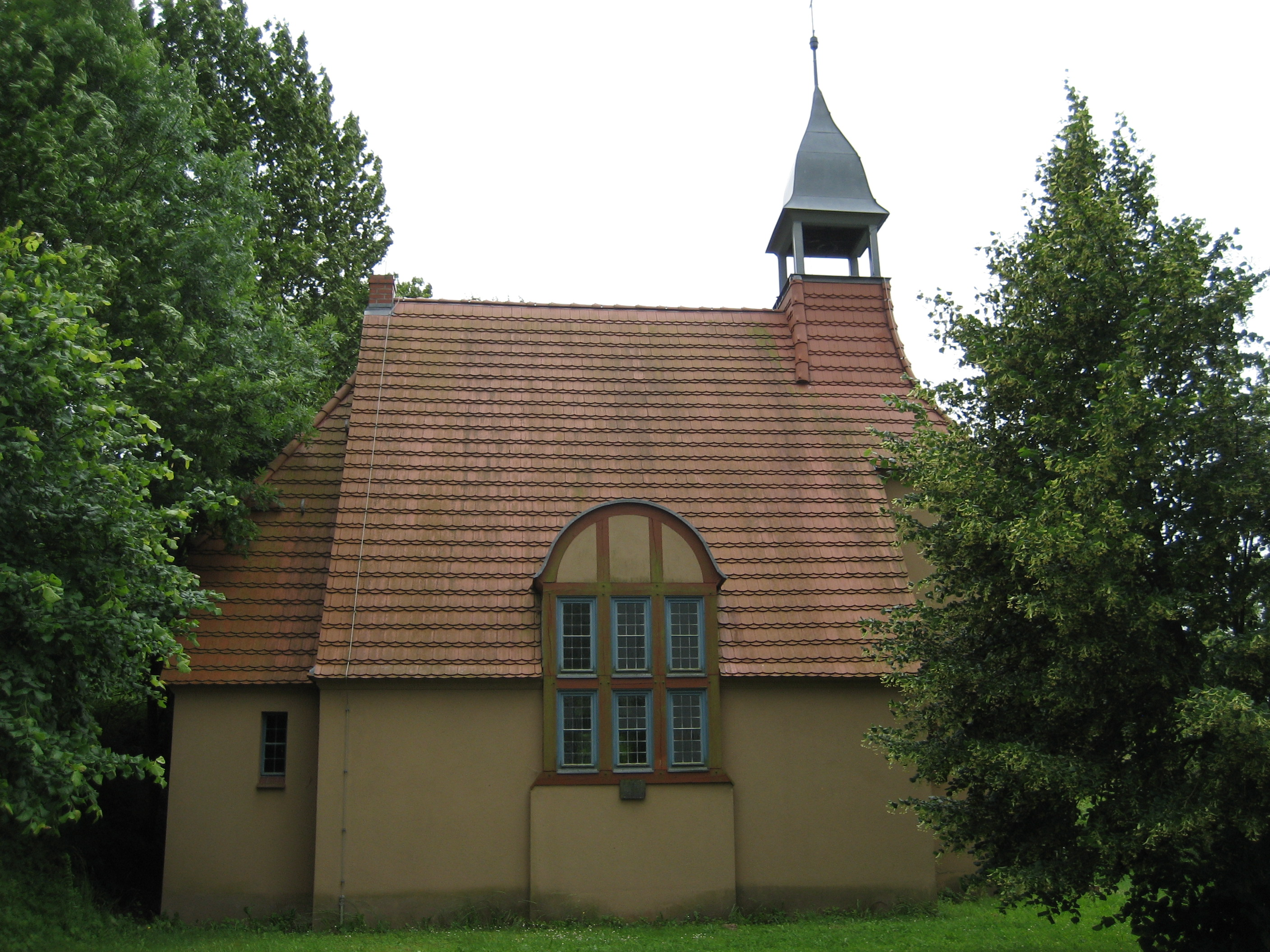 Evangelische Kapelle Wilhelmshof zwischen Plöwen und Ramin, bei Löcknitz.